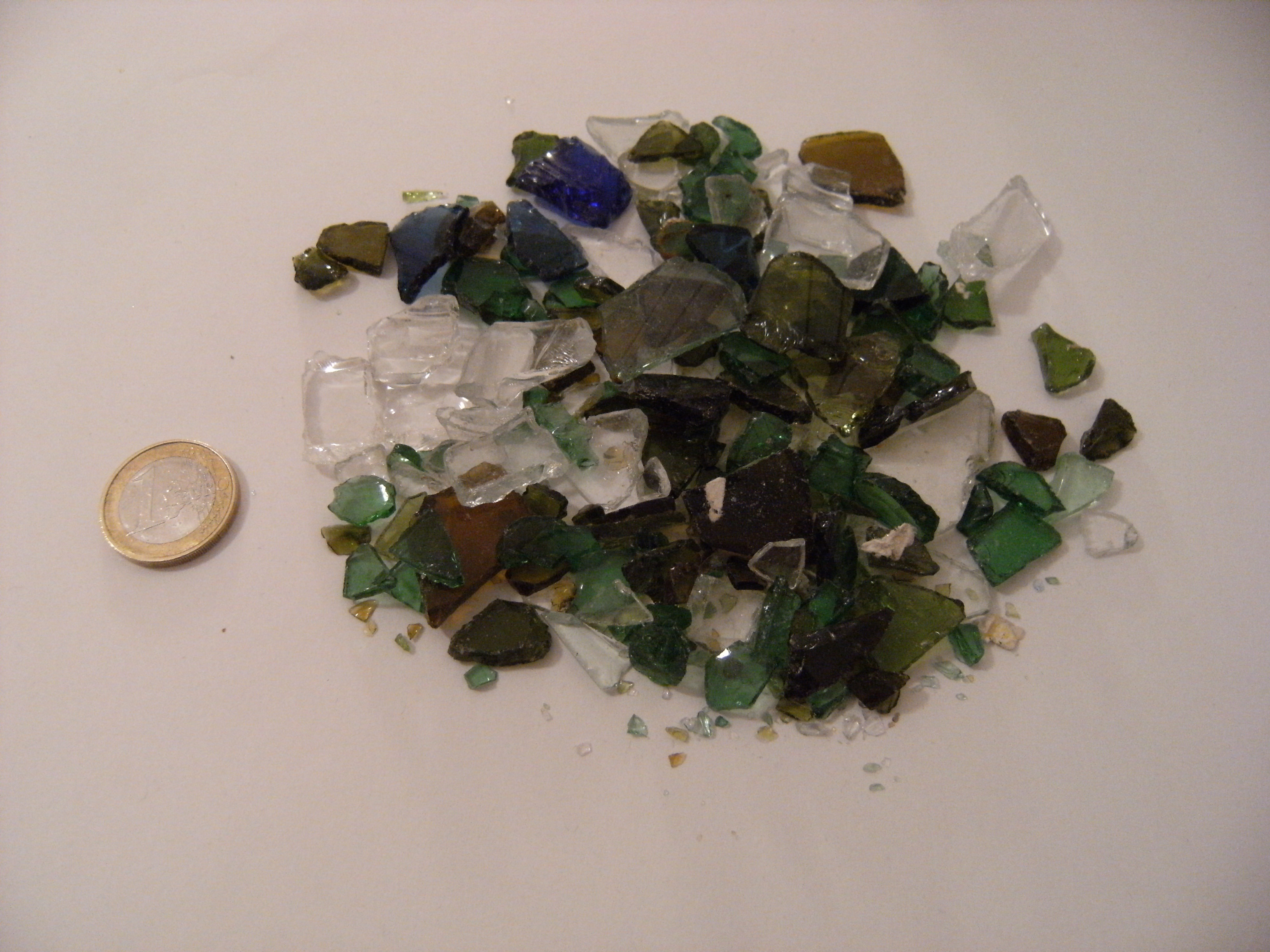 gewaschen und nachsortiert